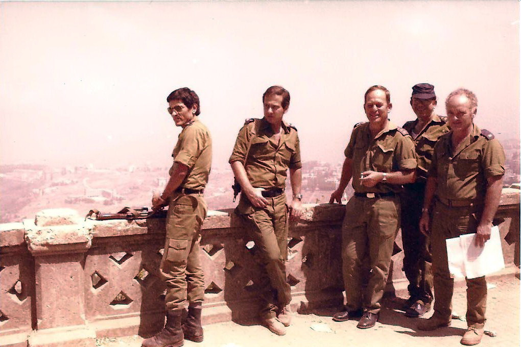 סיור אנשי מספן המודיעין בלבנון אוגוסט 1982